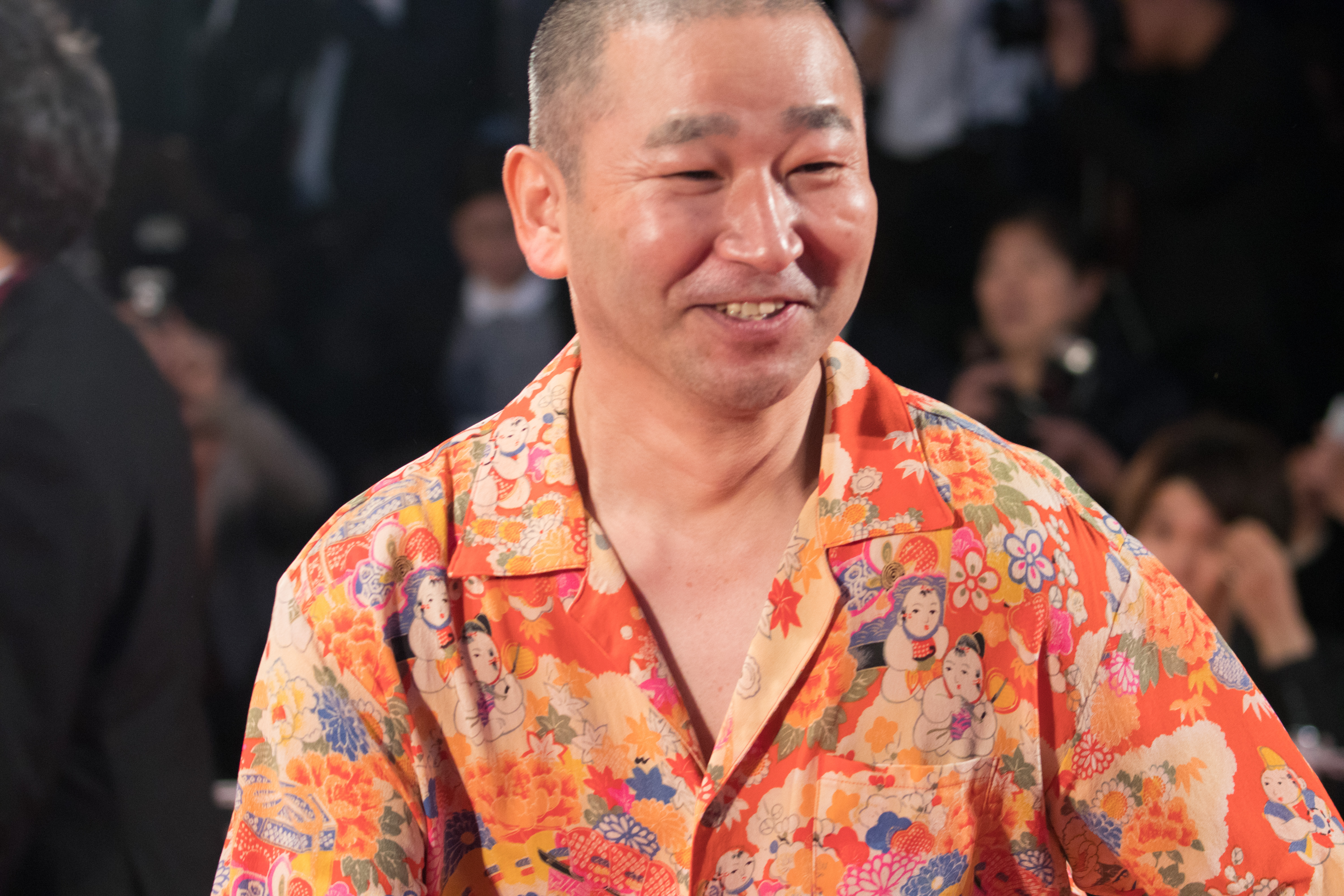 第29回 東京国際映画祭 オープニングセレモニー ウクレレえいじ (変態だ)